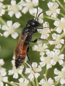 Tachysphex cf. pompiliformis am 8.7.2017 in der Schwetzinger Hardt